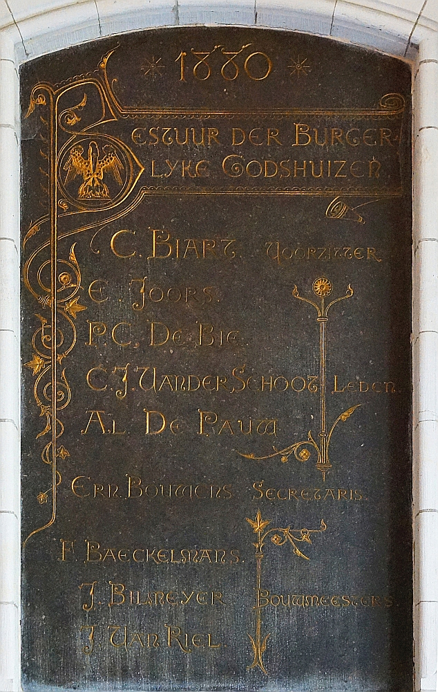 Stuivenbergziekenhuis Antwerpen Oprichtingsgedenksteen